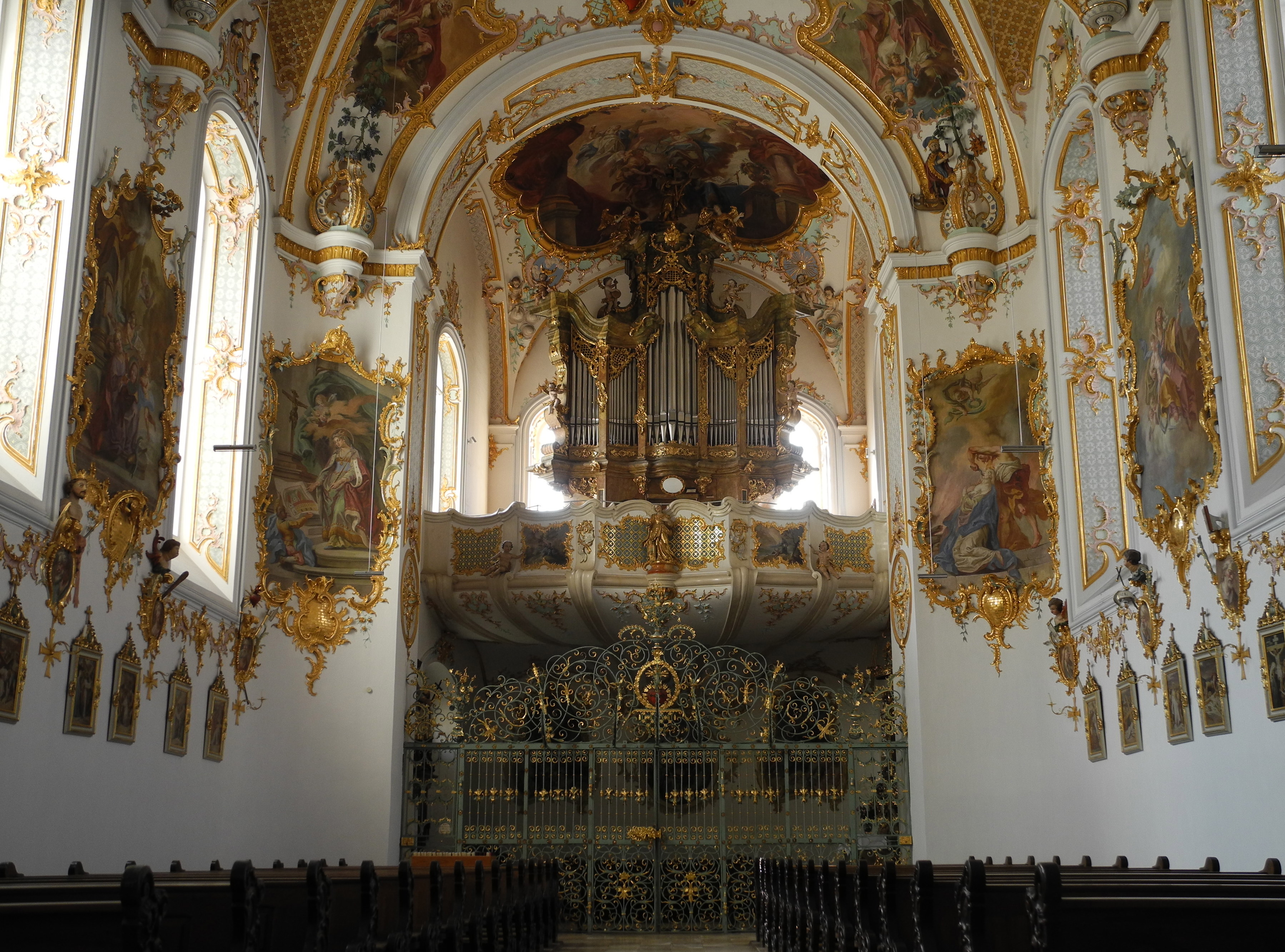 Werk Sandtner 1993 (26/II/P)